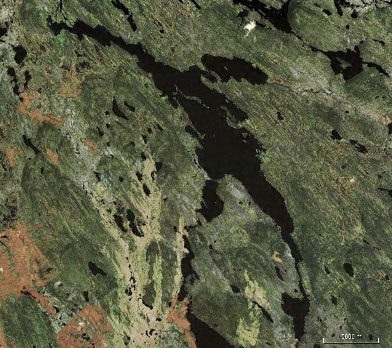 Lac Brûlé, à la frontière du Québec et de Terre-Neuve-Labrador